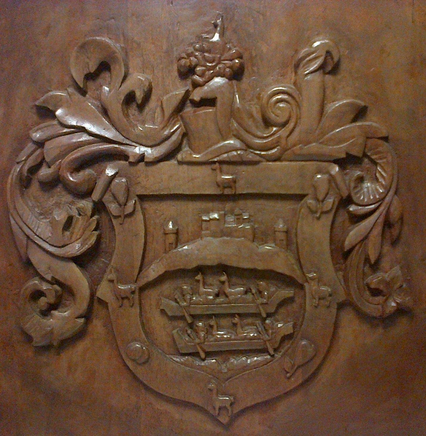 El escudo muestra dos canoas llenas de bastimentos, con cestas de pan, dos carneros y frutas de la tierra, y en cada una de las dos canoas se ven dos indios navegando con sus remos en las manos (inclinados hacia la siniestra) desde los asientos a cada extremo, sobre aguas onduladas del mar de colores azur y plata. En la parte superior o septentrional (encima de las canoas) hay un pueblo y dos atalayas o torres de vigilancia sobre un suelo verde y un fondo azur. En la misma dirección debajo de las canoas hay unas peñas o montañas del mismos color verde en plano meridiano o mediodía. “Y por orla cuatro carneros y cuatro panes y dos peras, todo de oro en campo colorado. Y un yelmo cerrado, con su rollo torcido, y por divisa una cesta con el dicho bastimento (del carnero)”. Vientos de Ría, 2006 pagina 59.